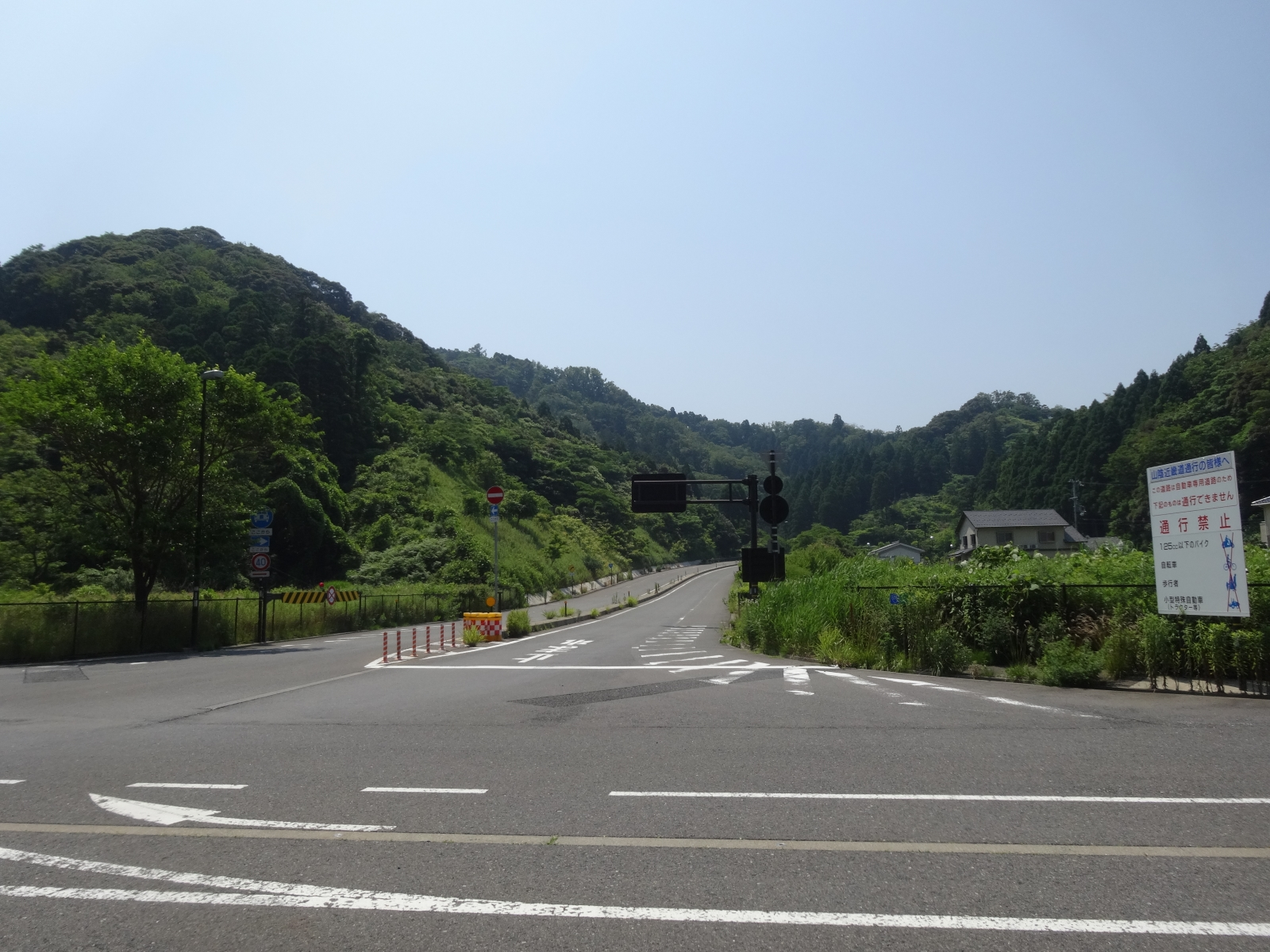 居組インターチェンジ（東浜居組道路）